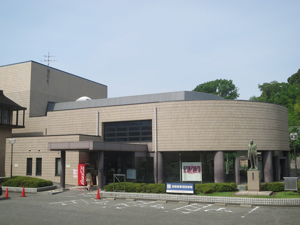 岡崎市 甲山会館